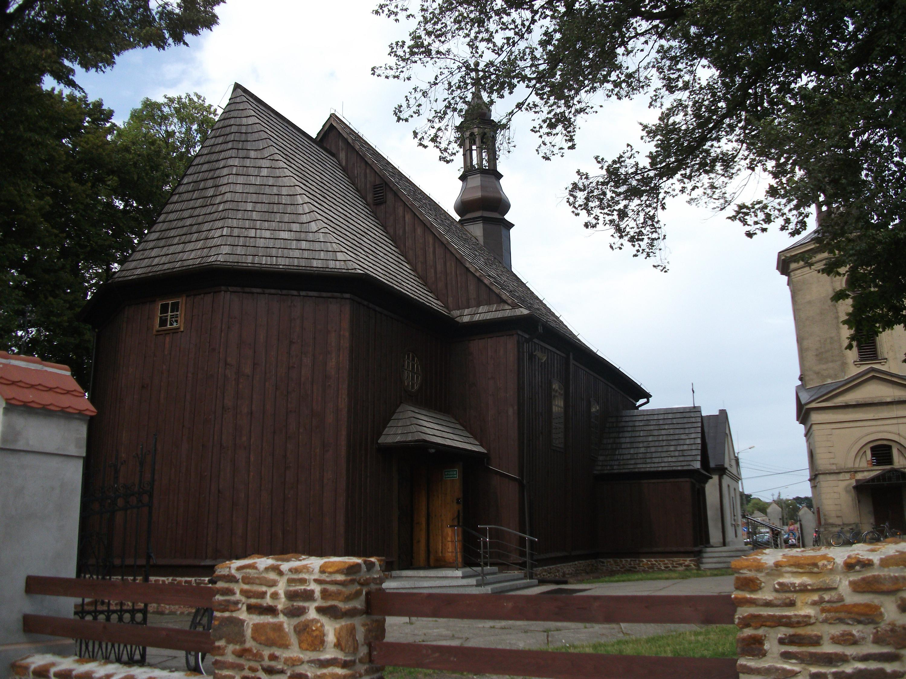 Kościół w Skomlinie k/Wielunia